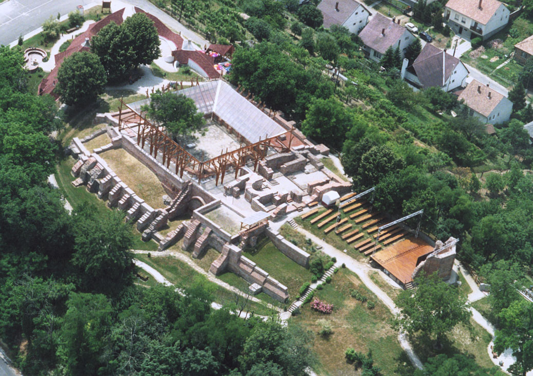 Bencés apátság - Kaposszentjakab - Hungary - Europe